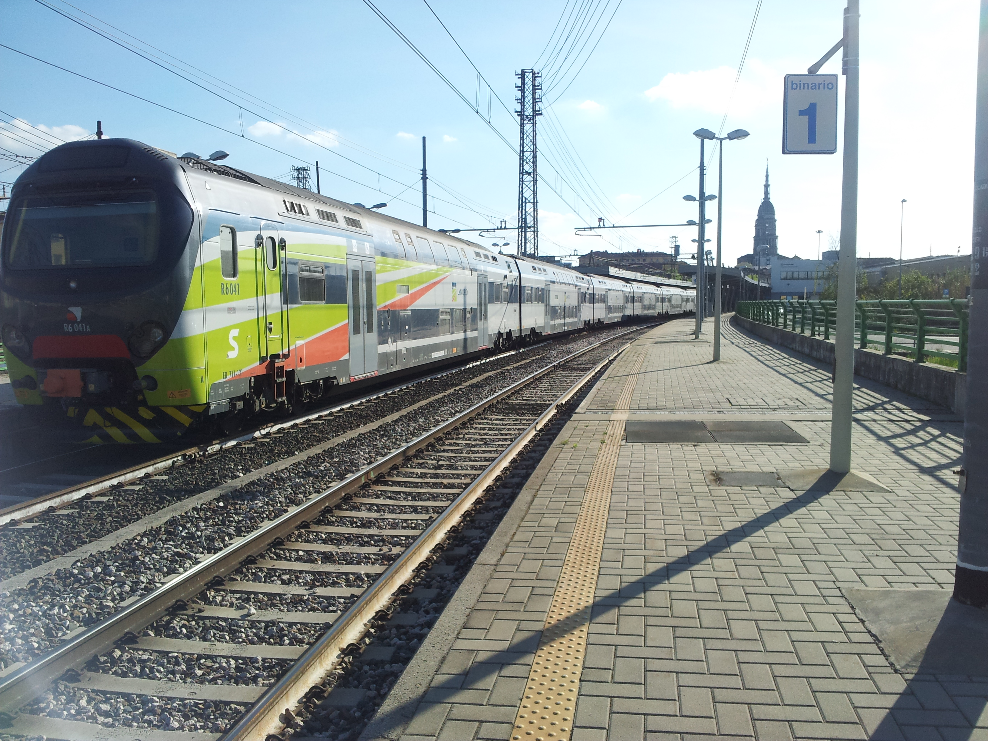 Stazione lato binari, in direzione Novara. Treno LeNord R6 041 in sosta sul binario 2.